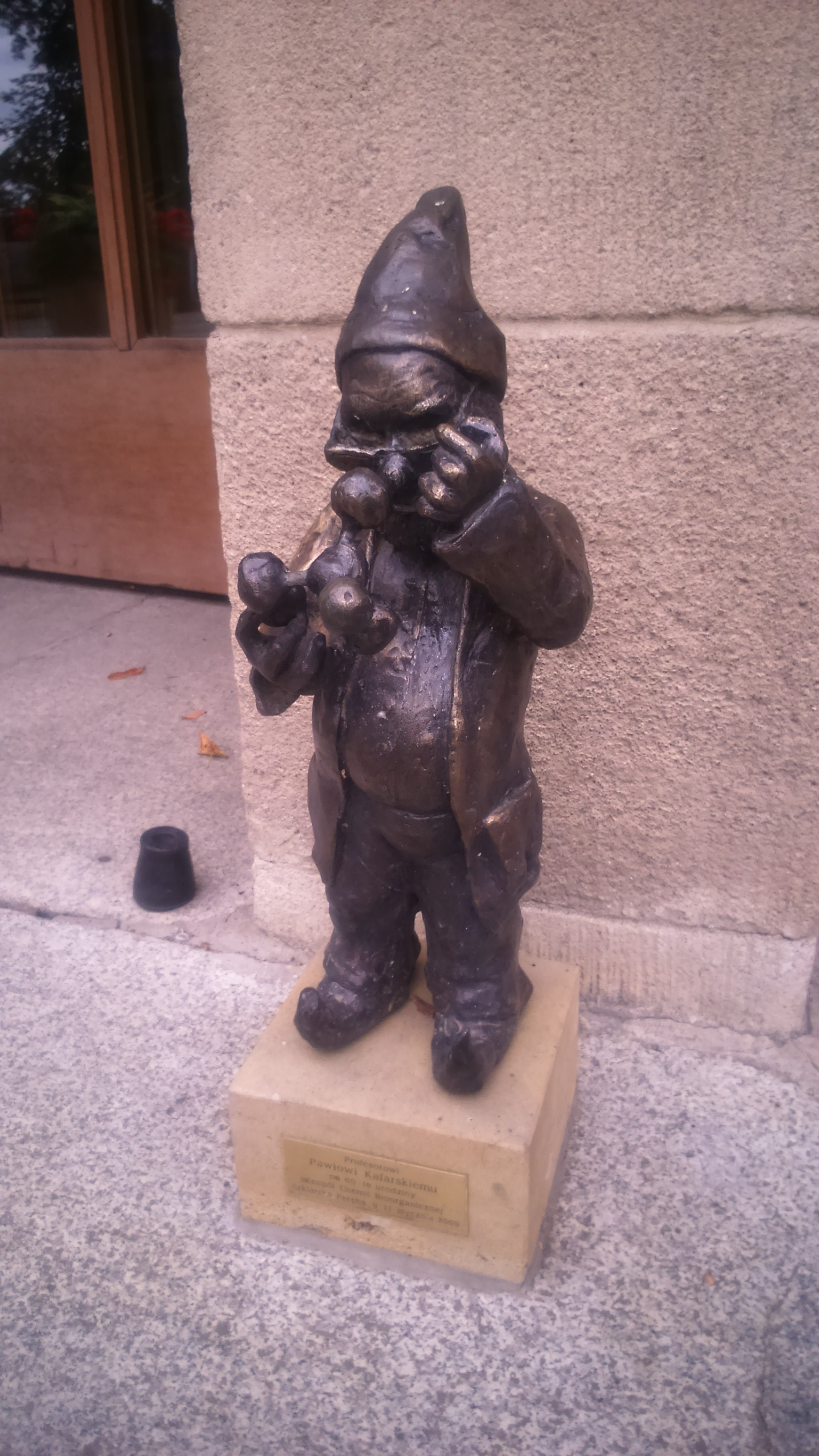 Krasnal Chemik we Wrocławiu